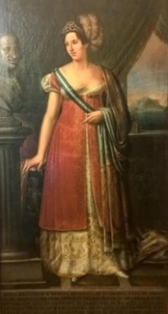 Lucia Migliaccio, duchessa di Floridia e Principessa di Partanna